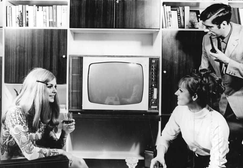 Werbung, RFT Color 20, Fernseher Zentralbild DFF-12.8.1969 Berlin: Hochwertiger Empfänger für das II. Fernsehprogramm des Deutschen Fernsehfunks, das einen Anteil farbiger Sendungen enthält - "RFT Color 20" aus der Produktion des VEB Fernsehgerätewerke Straßfurt besitzt eine implosionsgeschützte 59 cm Lochmaskenbildröhre und ist volltransistorisiert. Achtung Redaktion: Sperrfrist 12.8.19.30 Uhr